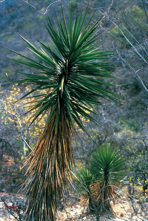 Yucca capensis in der Cape Region von Baja California.